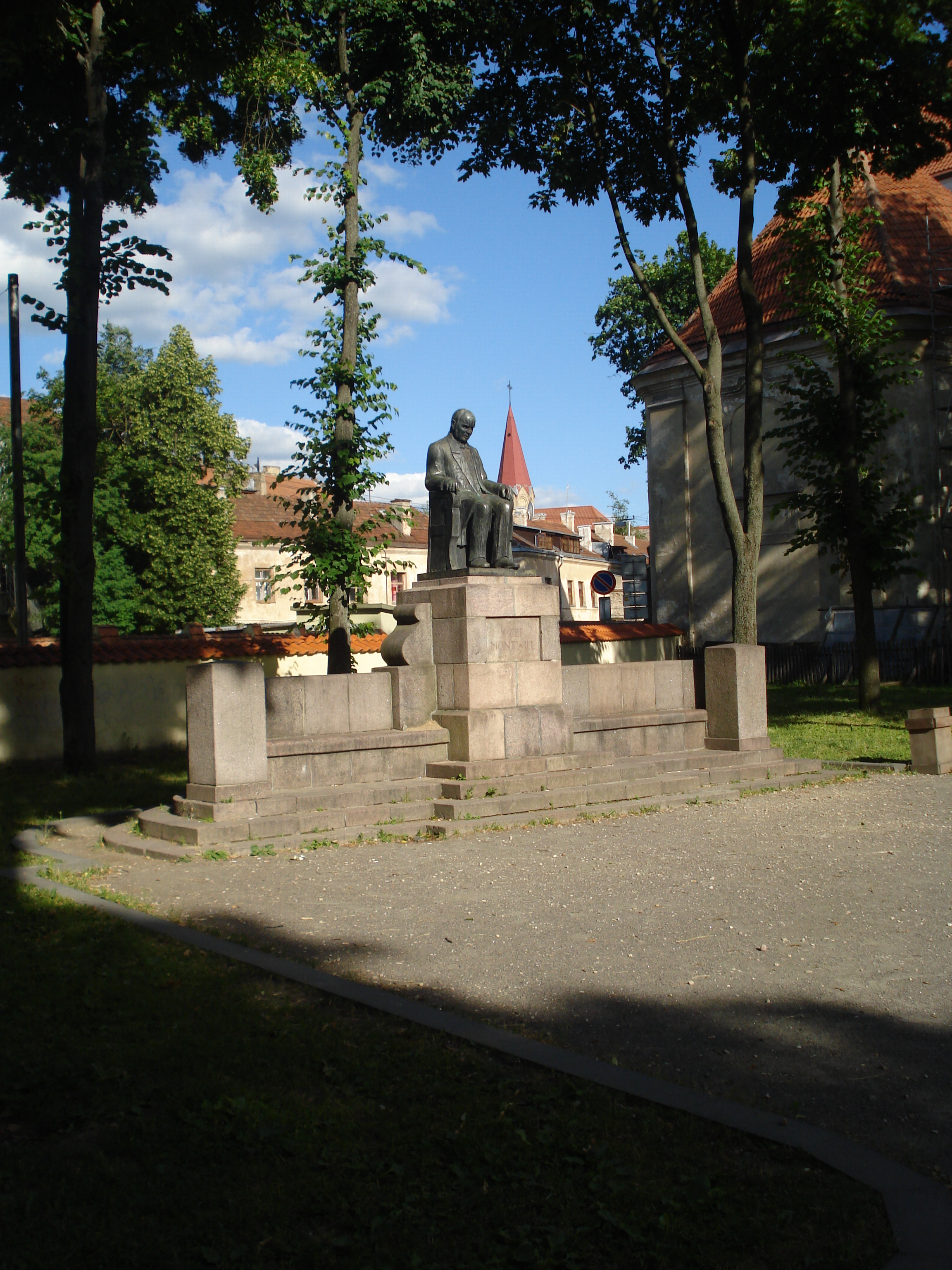 Józef Montwiłł in Vilnius. Trakų g. By Bolesław Bałzukiewicz (1935).